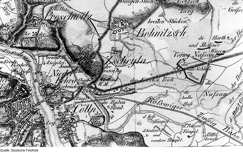 Original image description from the Deutsche Fotothek Meißen-Cölln. Oberreit, Sect. Großenhain, 1841/43